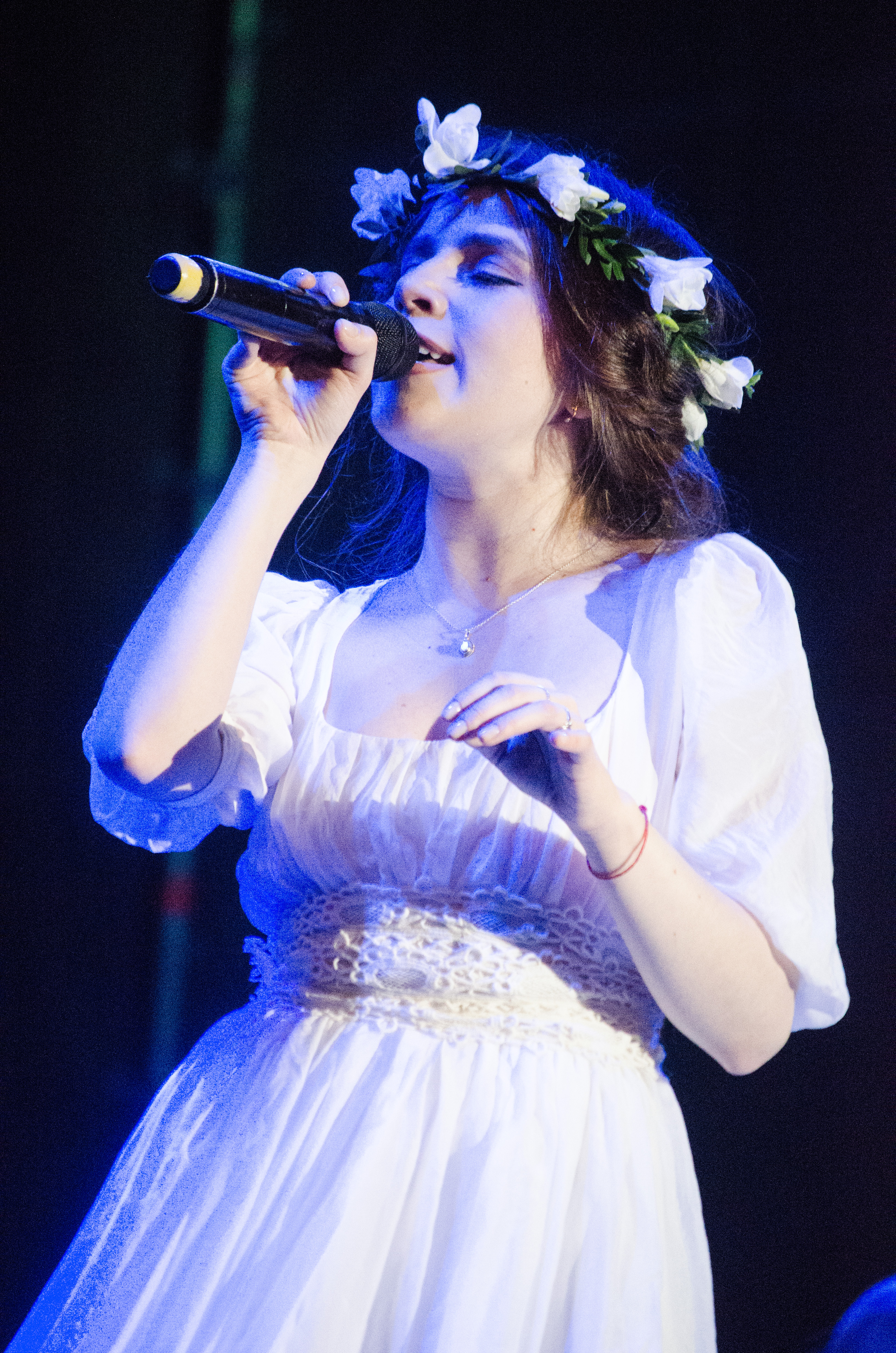 Христина Соловій, Atlas Weekend 2016.